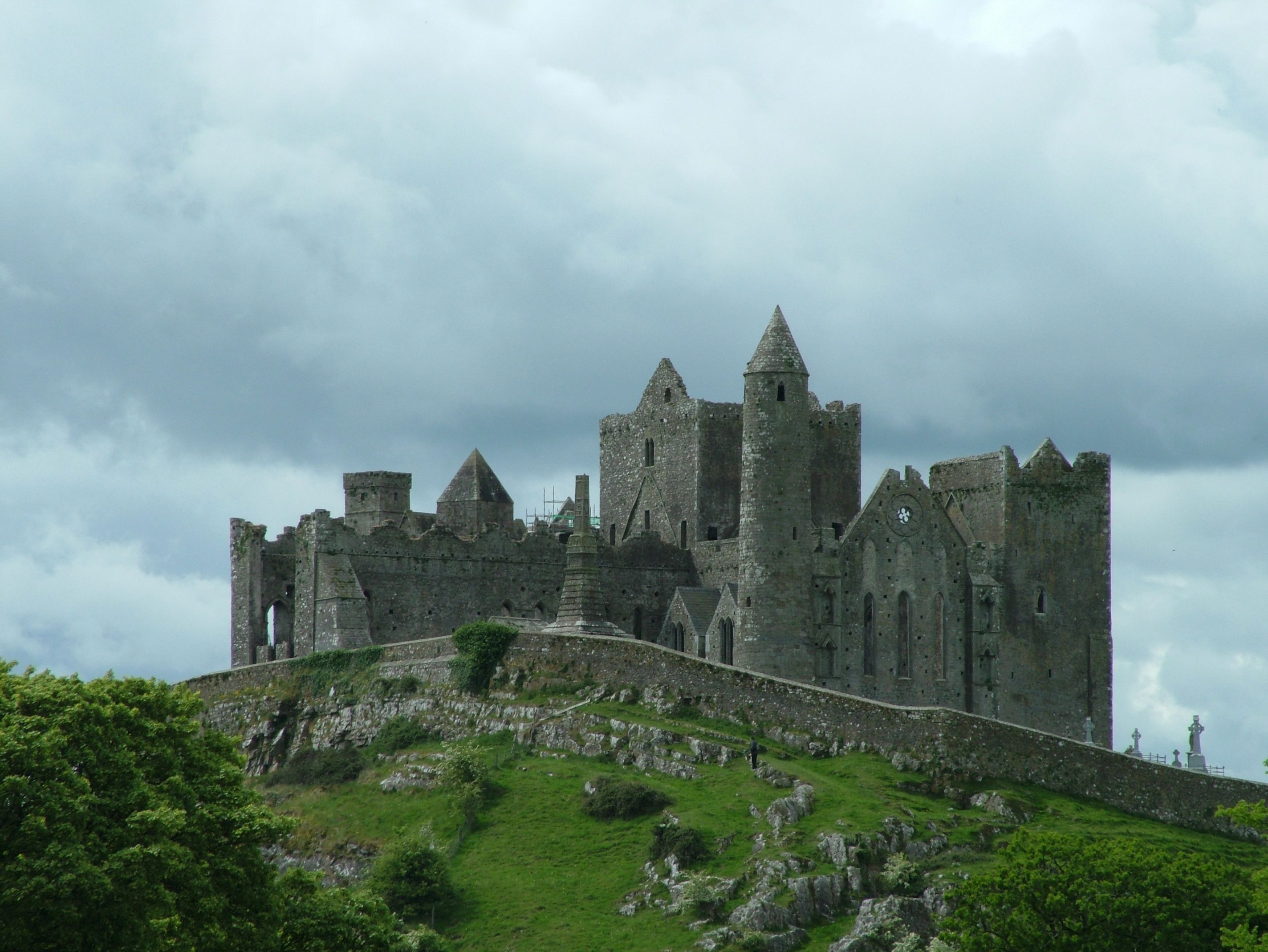 Rock of Cashel, Ireland, eine Übersicht von Norden